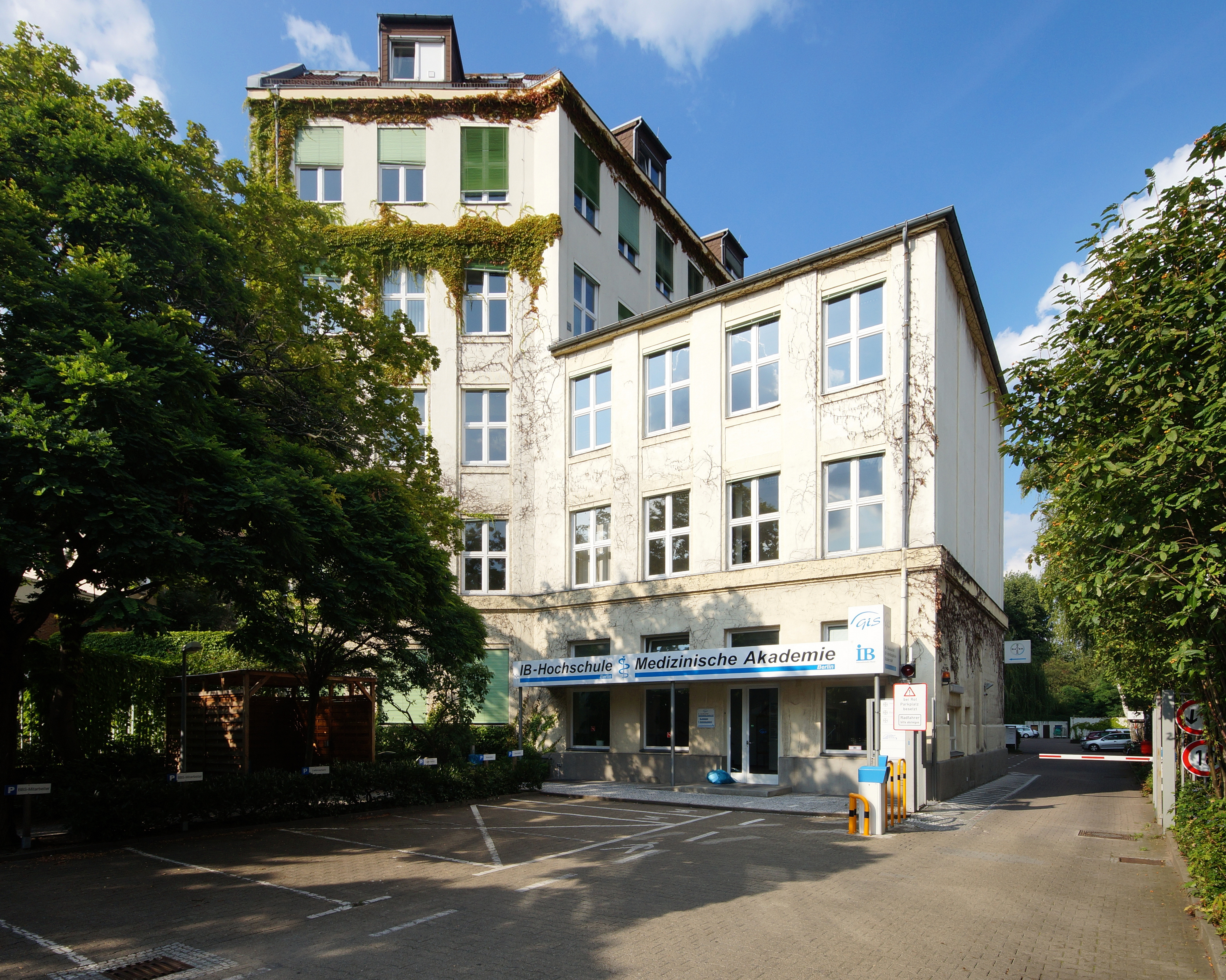 Die IB-Hochschule Berlin in der Gerichtstraße 27 in Berlin-Gesundbrunnen